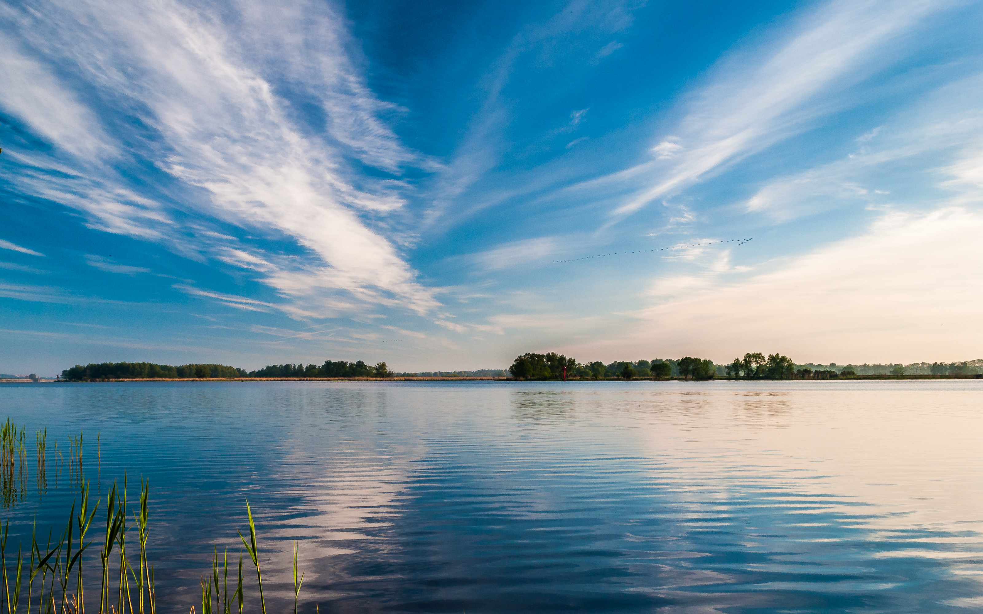 Specjalny obszar ochrony siedlisk Ujście Odry i Zalew Szczeciński. This is a photography of Natura 2000 protected area with ID PLH320018